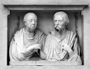 Relief in der Kasseler Luisenstraße. Foto von K.Ch.Stiehl. Sie schreibt:Eines zeigt ein Gemälde der Luise von Bose als Kind, ein anderes das beschriebene Relief mit Ehemann. Das letzere habe ich selbst fotografiert, vom ersten haben wir die Genehmigung des Museums "Neue Gallerie". Ich stelle es deshalb als GFDL-own work.